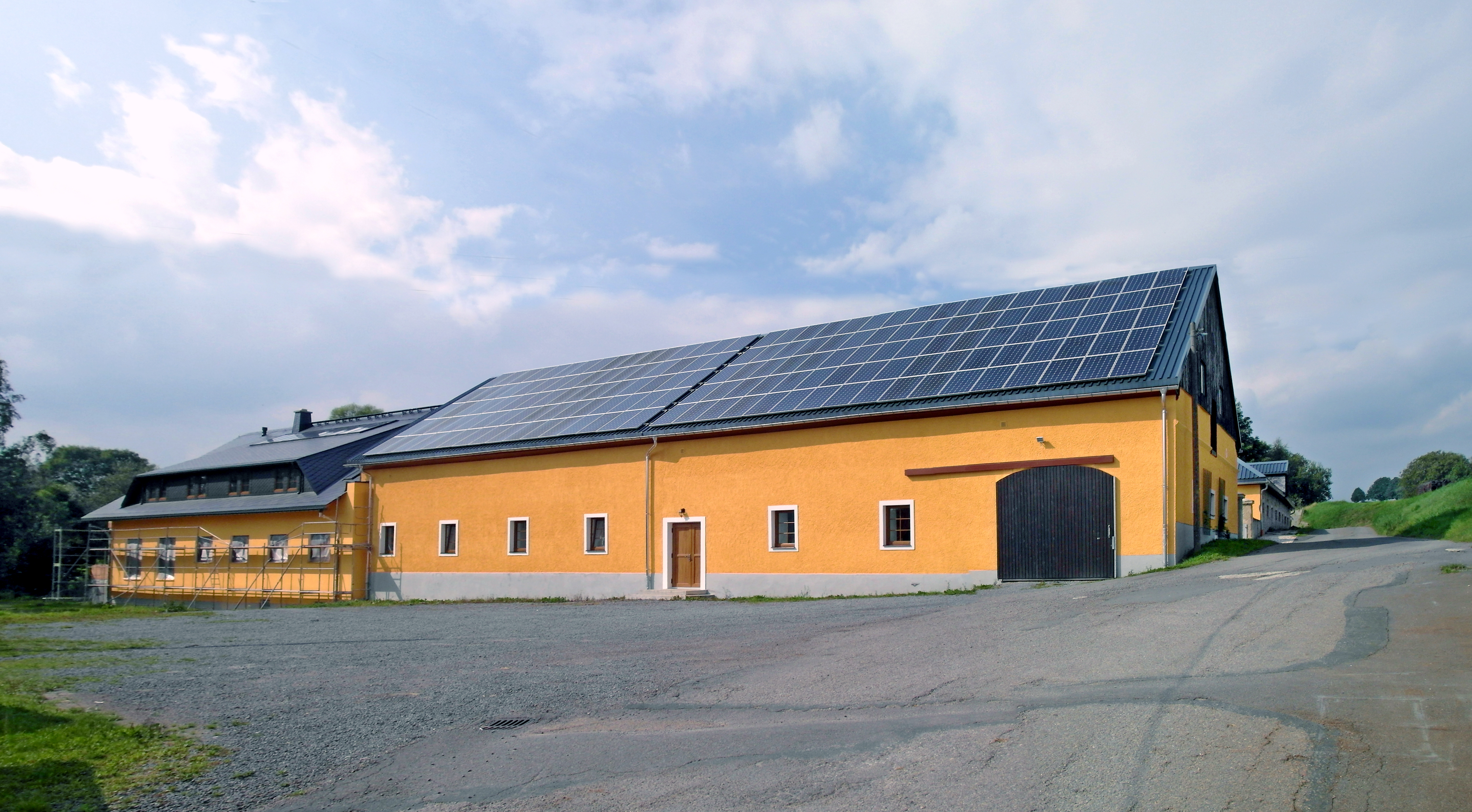 27.08.2017 09526 Haselbach (Olbernhau) Dorfstraße: Rittergut NiederHaselbach (GMP: 50.731440,13.309395). Blick von außen aus Südosten zum Gebäude GMP: 50.731217,13.309441. [SAM1650-1651.JPG]20170817300MDR.JPG(c)Blobelt